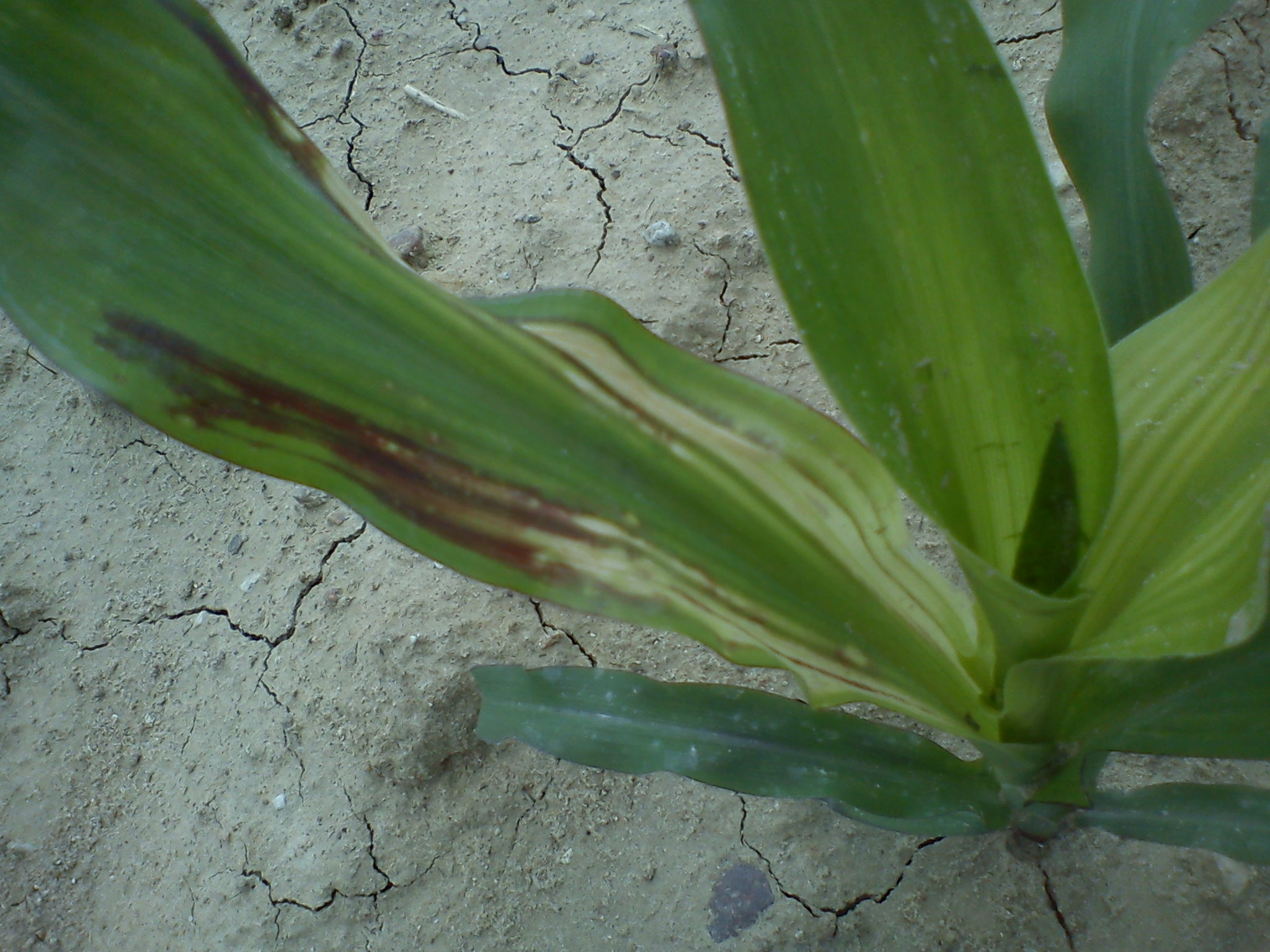 silny niedobór cynku